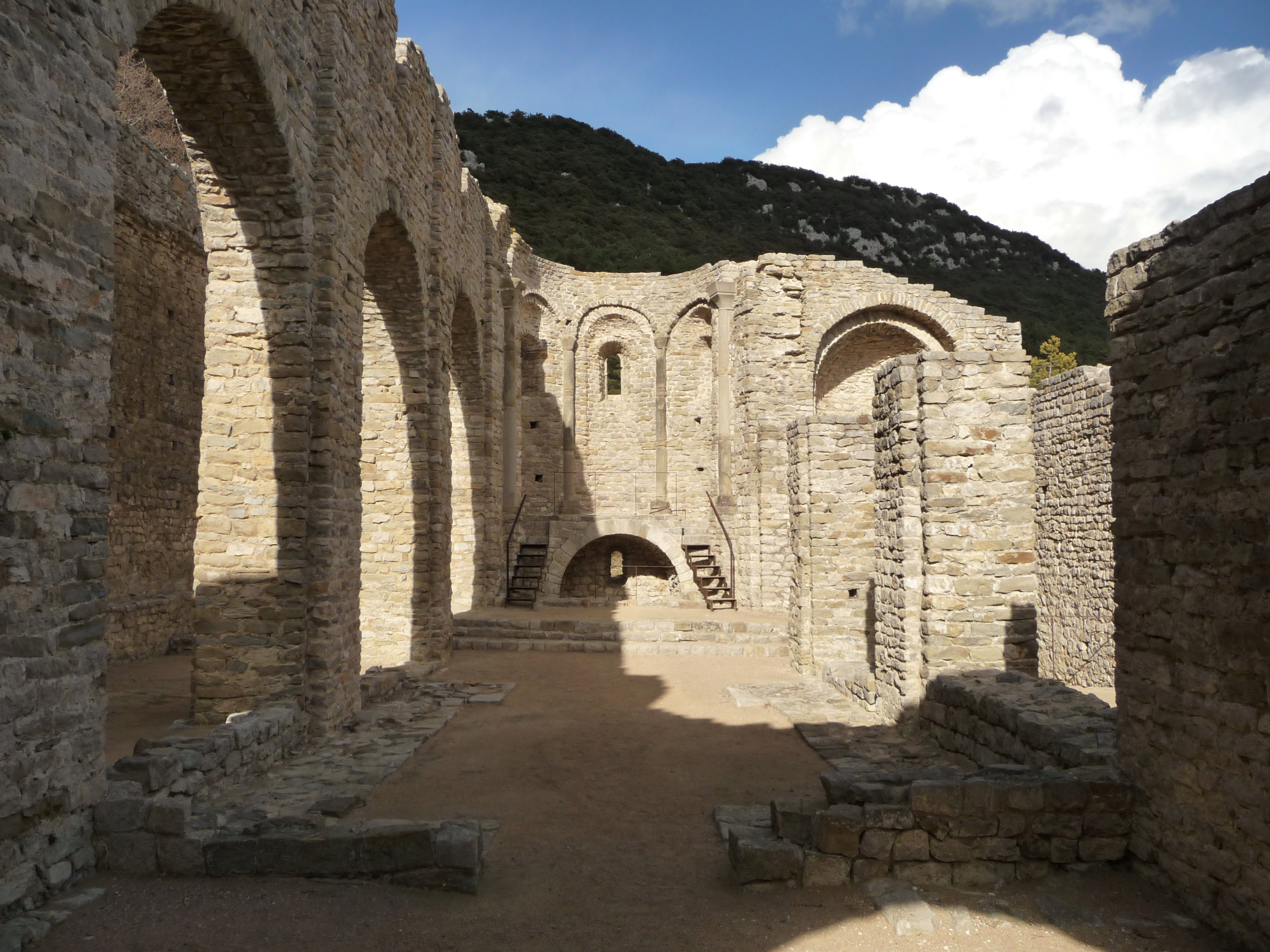 Nau i absis centrals i arc triomfal de l'absis sud rere els pilars, Sant Llorenç del Mont (Alt Empordà)